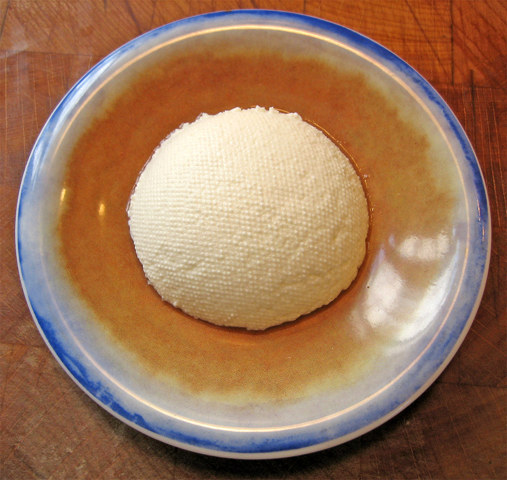 dalla lavorazione del formaggio fresco, la ricotta